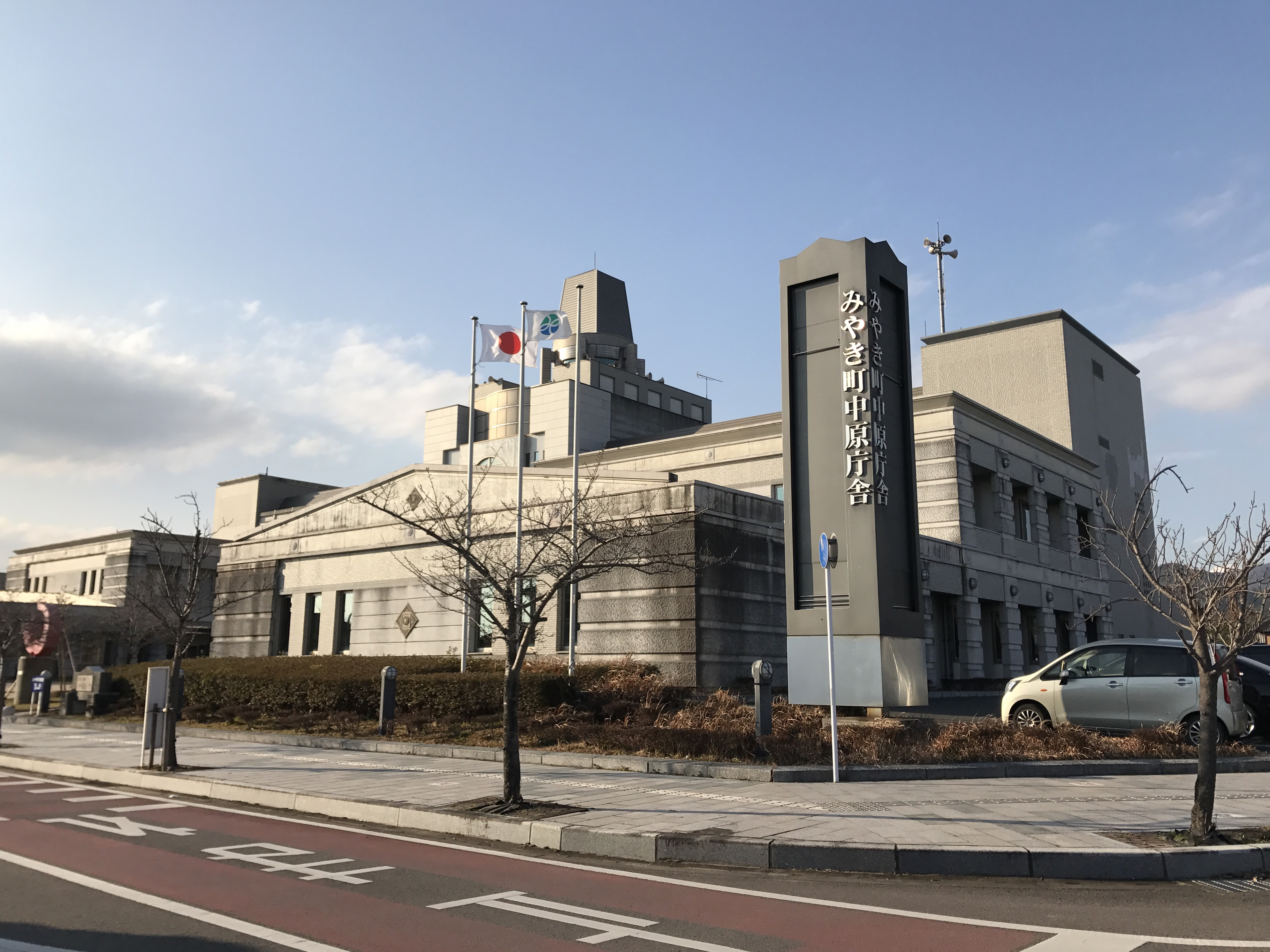 みやき町役場中原庁舎